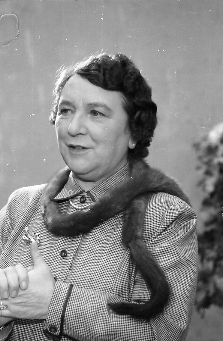 München: Dreharbeiten zu dem Film In München steht ein Hofbräuhaus; Liesl Karlstadt als Wirtin des Hofbräuhauses; Portrait